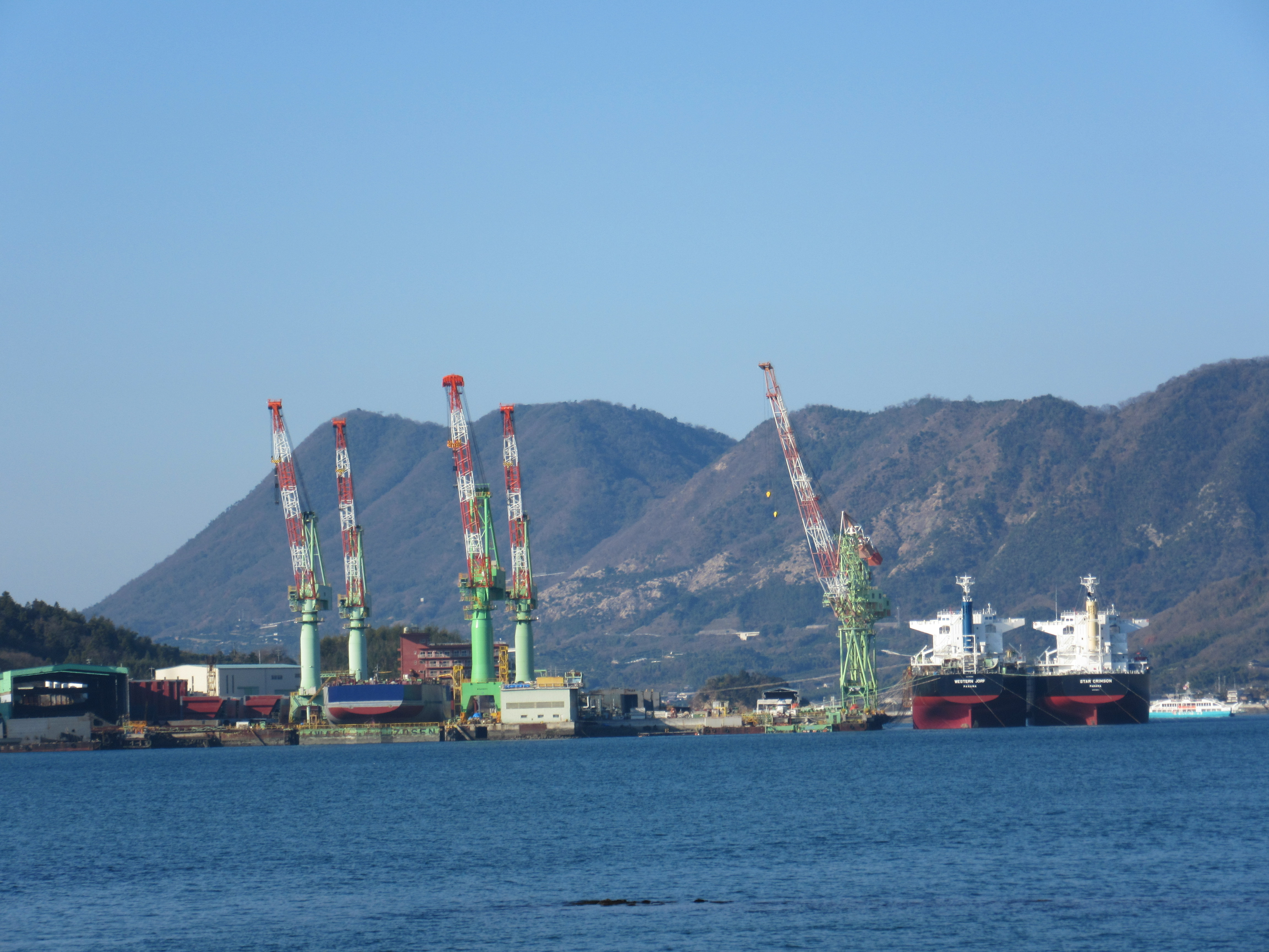 岩城造船工場